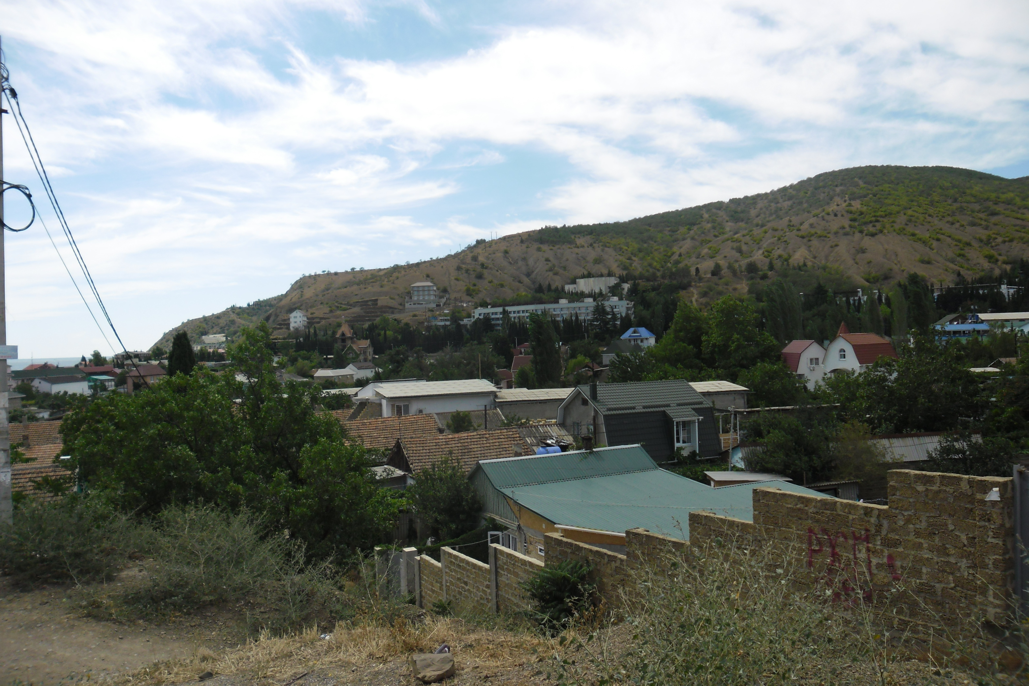 Фото